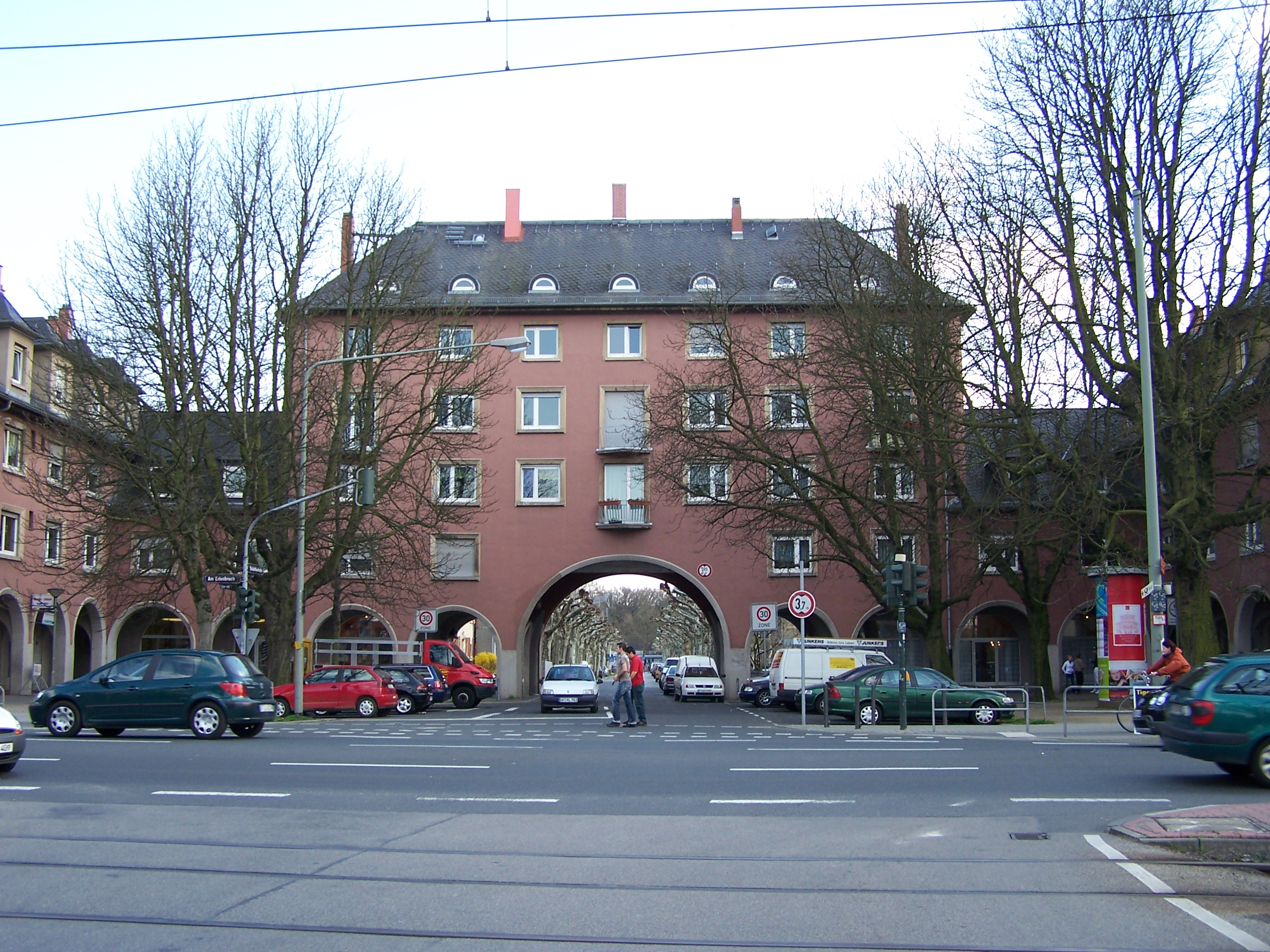 Torhaus in der Schäfflestraße, Ecke Erlenbruch